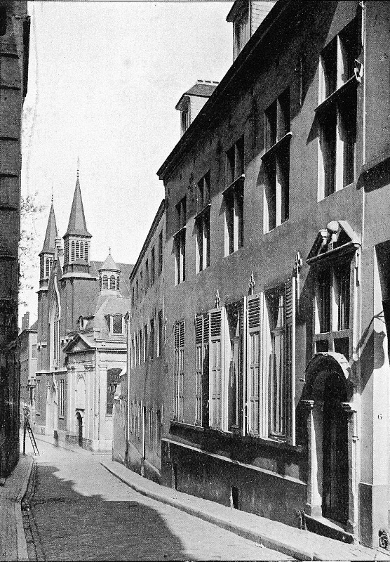 La chapelle Salazar au milieu, à coté de la nouvelle chapelle du Saint-Sacrement construite en 1834. à gauche de la photographie, la partie de l'hotêl Ravenstein connue comme "La synagogue".